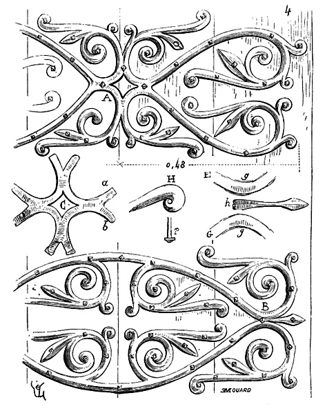 Neuvy-Saint-Sépulchre,Portalbänder, Grafik 1856